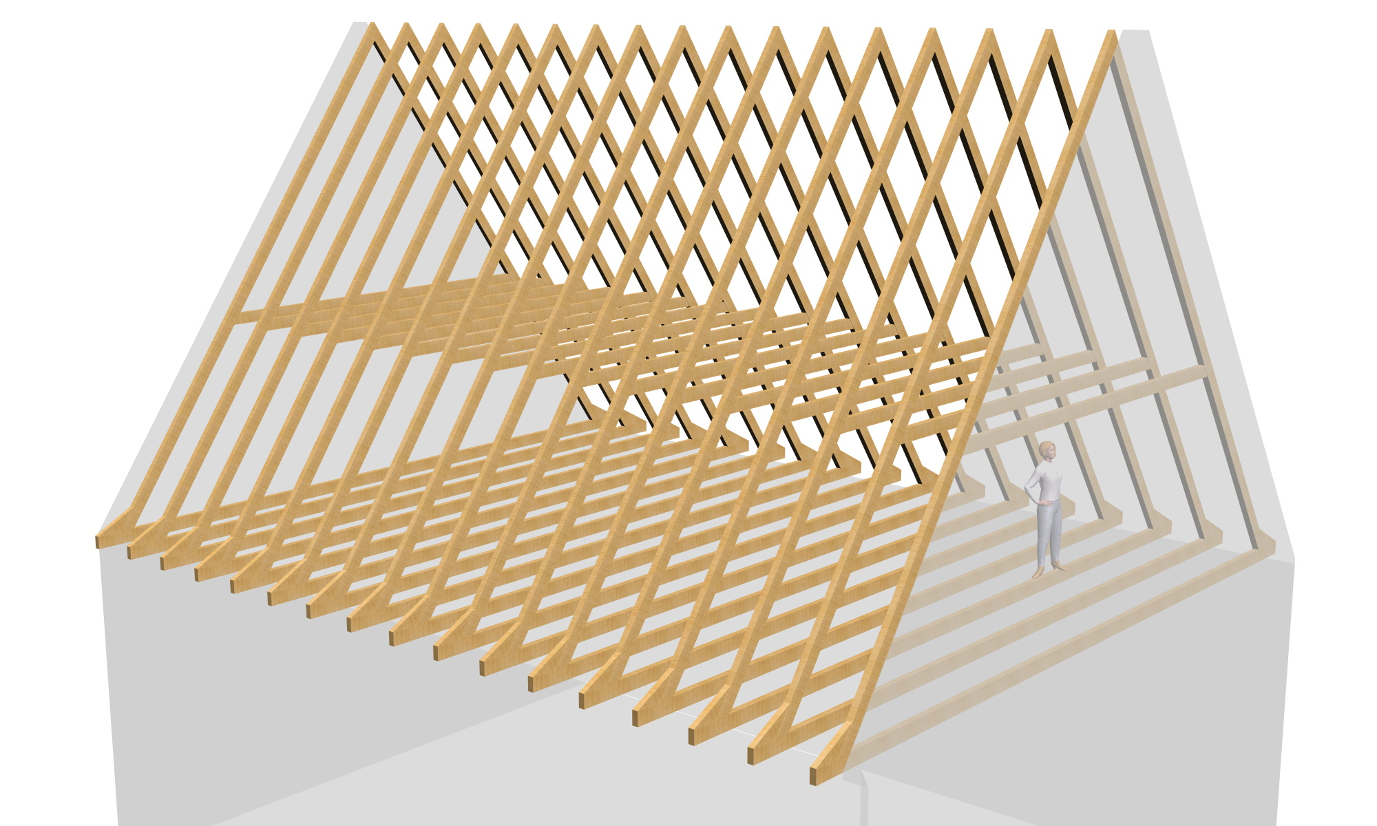 Kehlbalkendach mit Holzdecke